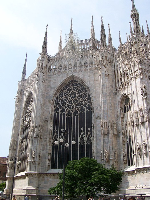 Milano - Abside del Duomo